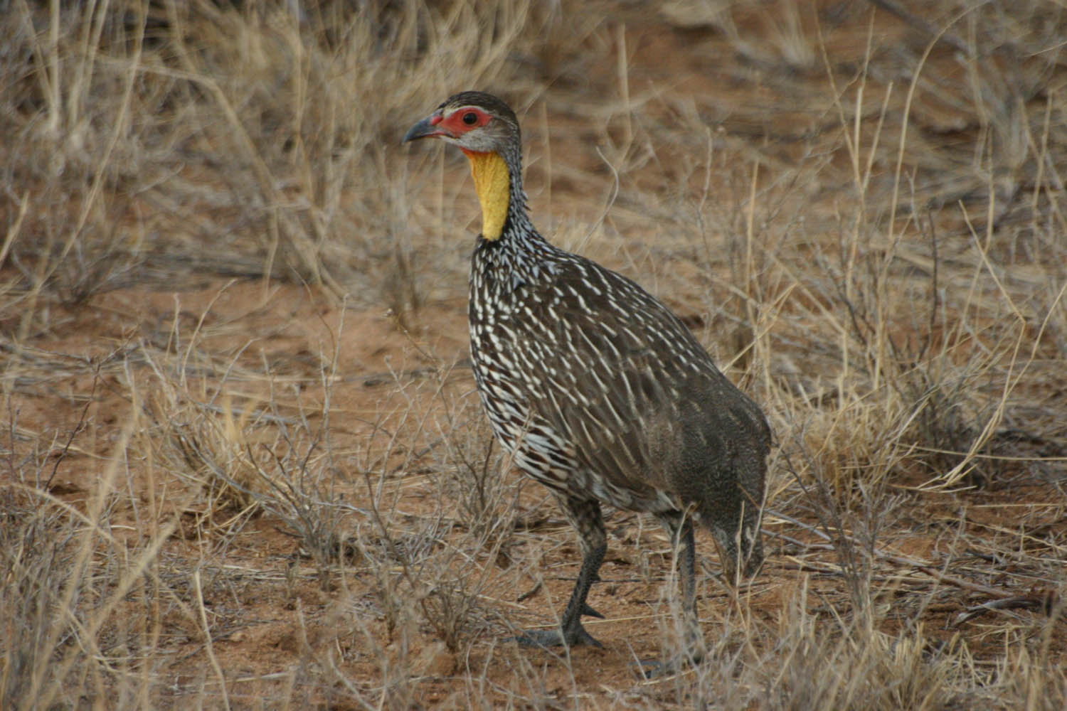 Titre : Pternistis leucoscepus Description : Francolin de la réserve nationale de Samburu (Kenya, Afrique) Catégorie : Album » Kenya » Samburu Format : jpg Résolution : 1500x1000 Taille : 213 Ko